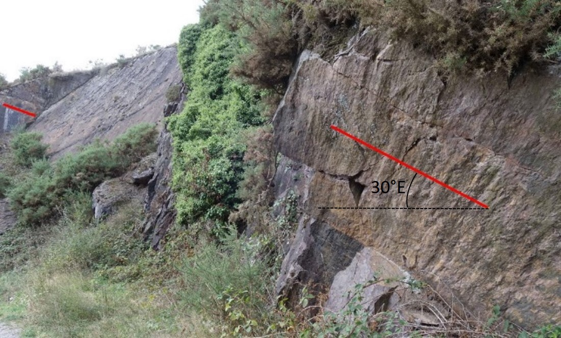 Au pied de la Butte de Tiot, une ancienne carrière à 3 km au nord de Campénéac montre un affleurement de formation ordoviciennes de Pont-Réan type Le Boël (diversement dénommé dans la littérature sous les termes de « Schistes de Pont-Réan », « Schistes pourprés », « Schistes lie-de-vin », « Dalles pourprées », « Schistes et poudingues de Montfort », « Schistes de Margat »). Le trait rouge montre la trace des plans de stratification des couches à pendage d’environ 30° E. La carrière montre également un miroir de faille.